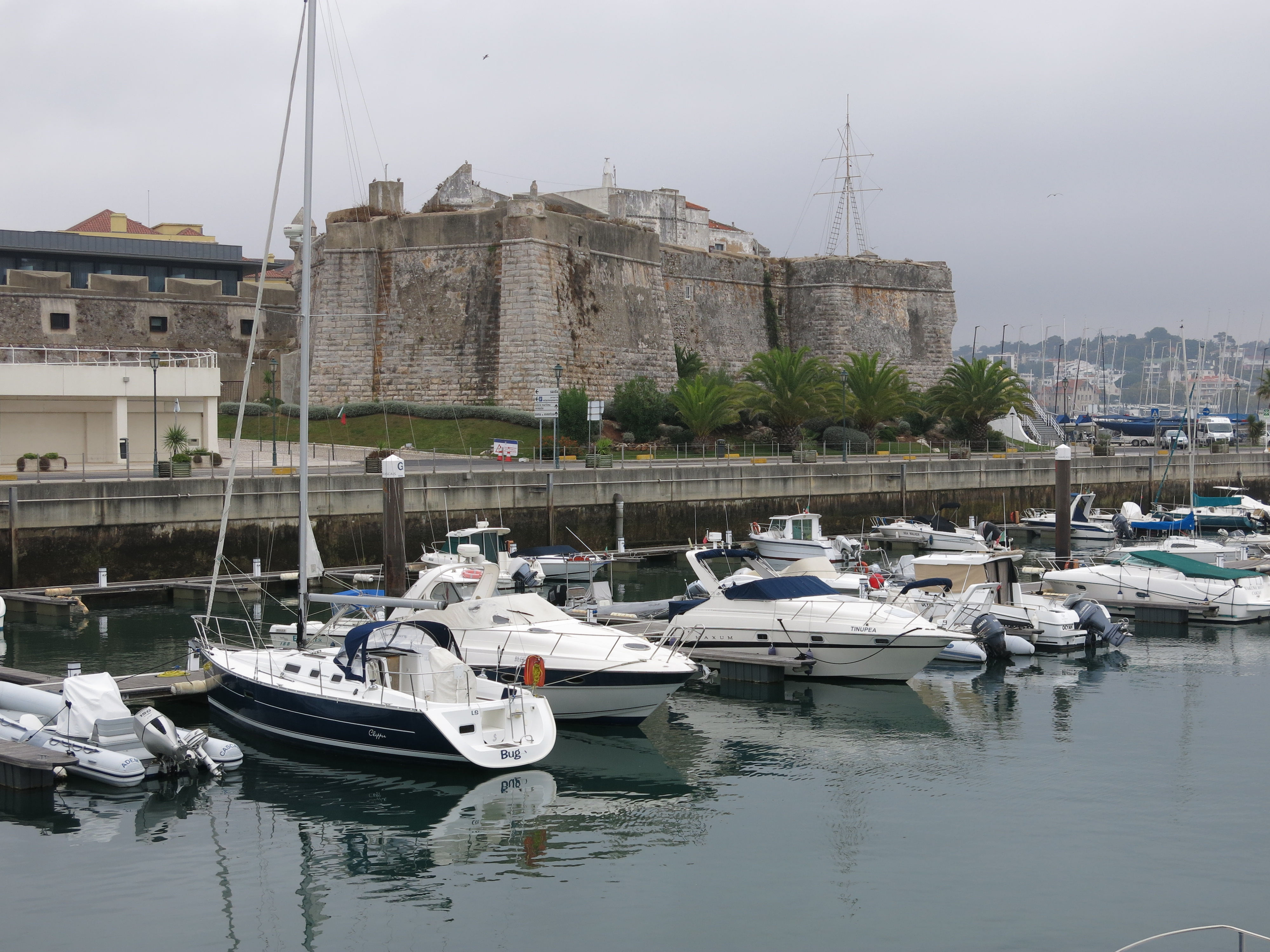 2016-10-21_Cascais_6201